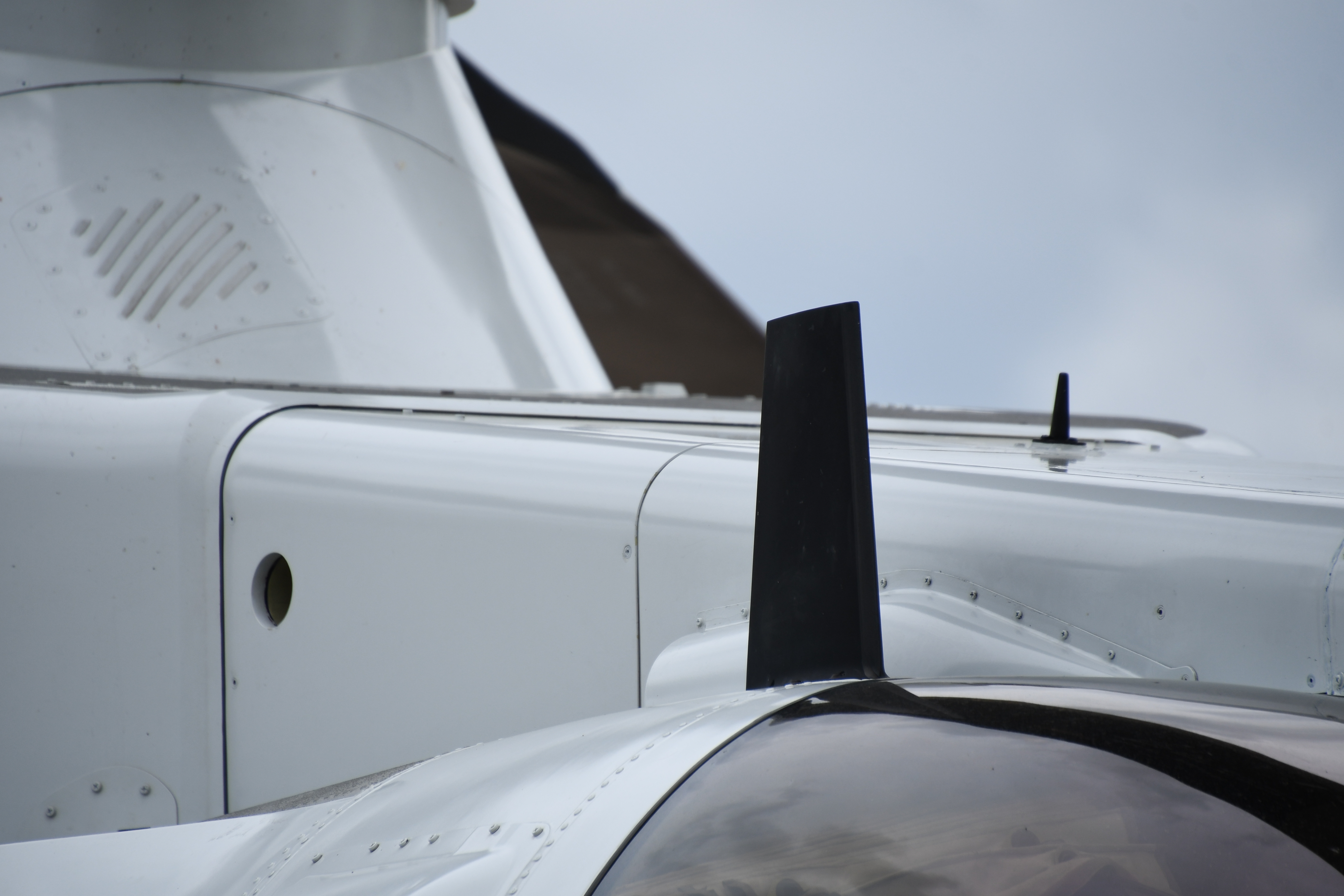 海上自衛隊 MCH-101掃海・輸送ヘリコプター（8657号機） 機首上のブレードアンテナ 右前面。2019年5月18日 舞鶴航空基地にて。